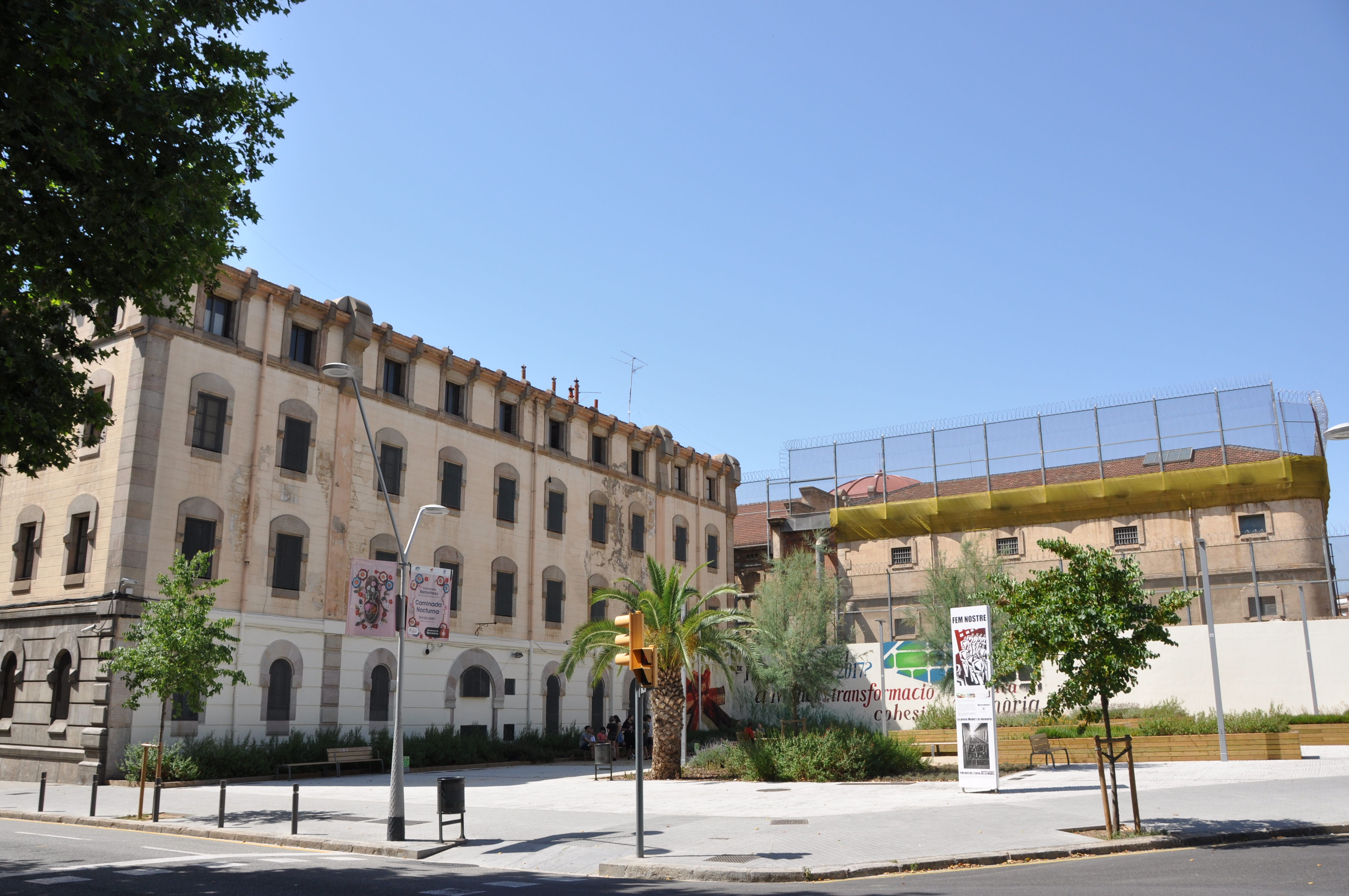 Jardí que es va fer com a consequencia de l'enderroc simbòlic d'uns edificis de la presó model (any 2015), a la cantonada dels carrers Entença i Mallorca